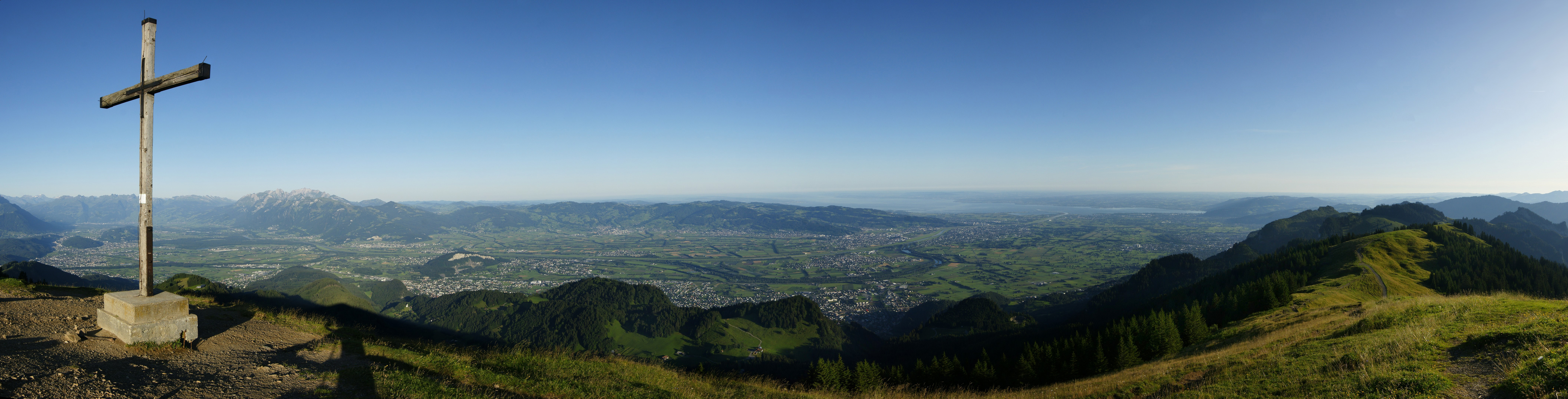 6 Uhr 30, 180° Morgenpanorama vom Gipfel der Hohen Kugel 1645m, ob Götzis. Blick in das untere Rheintal, auf Diepoldsau eingebettet zwischen dem neuen und alten Alpenrhein. Die Vorarlberger Städte Feldkirch, Hohenems, Dornbirn und Bregenz am Bodensee. Zu sehen ist weiters die Schweizer Alvierkette, die Churfirsten, und das Alpsteingebirge. Am unteren Bildrand links der Ortsteil Meschach und mittig Millrüte.